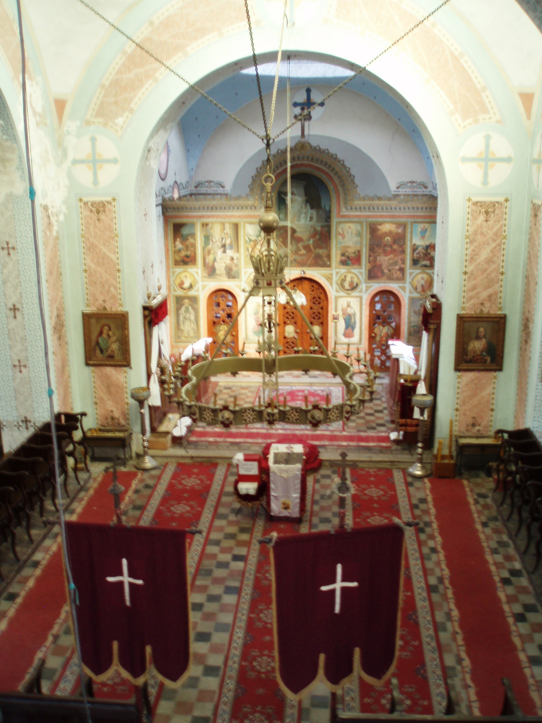 Crkva u Orlovatu, ikonostas, rad Uroša Predića, autor fotografije: Nicolo